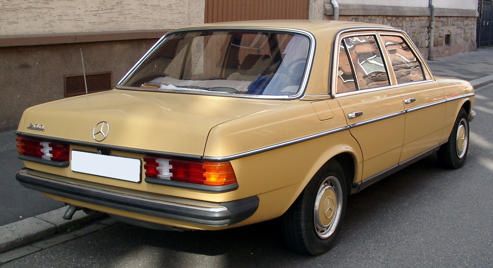 Mercedes-Benz W123